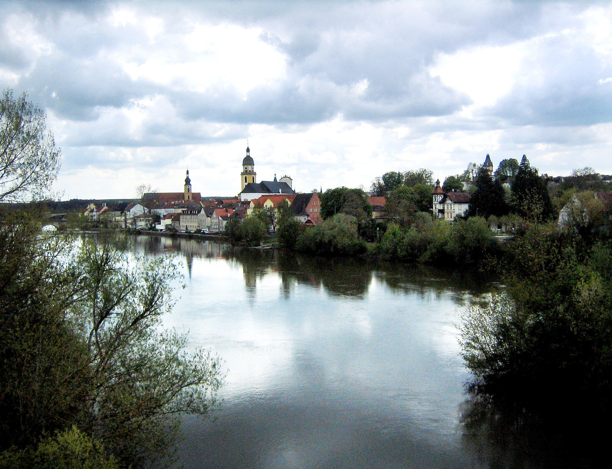 Kitzingen von der Nordbrücke aus gesehen